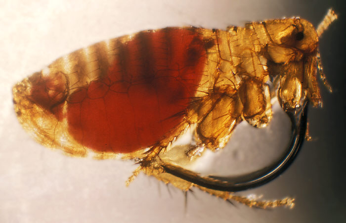 Rattenfloh, infiziert mit Yersinia pestis